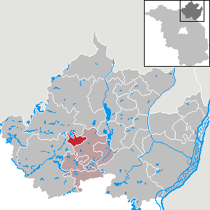 Mittenwalde in Brandenburg (Country) - District Uckermark